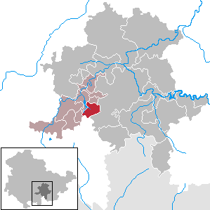 Meura in Thuringia - District Saalfeld-Rudolstadt